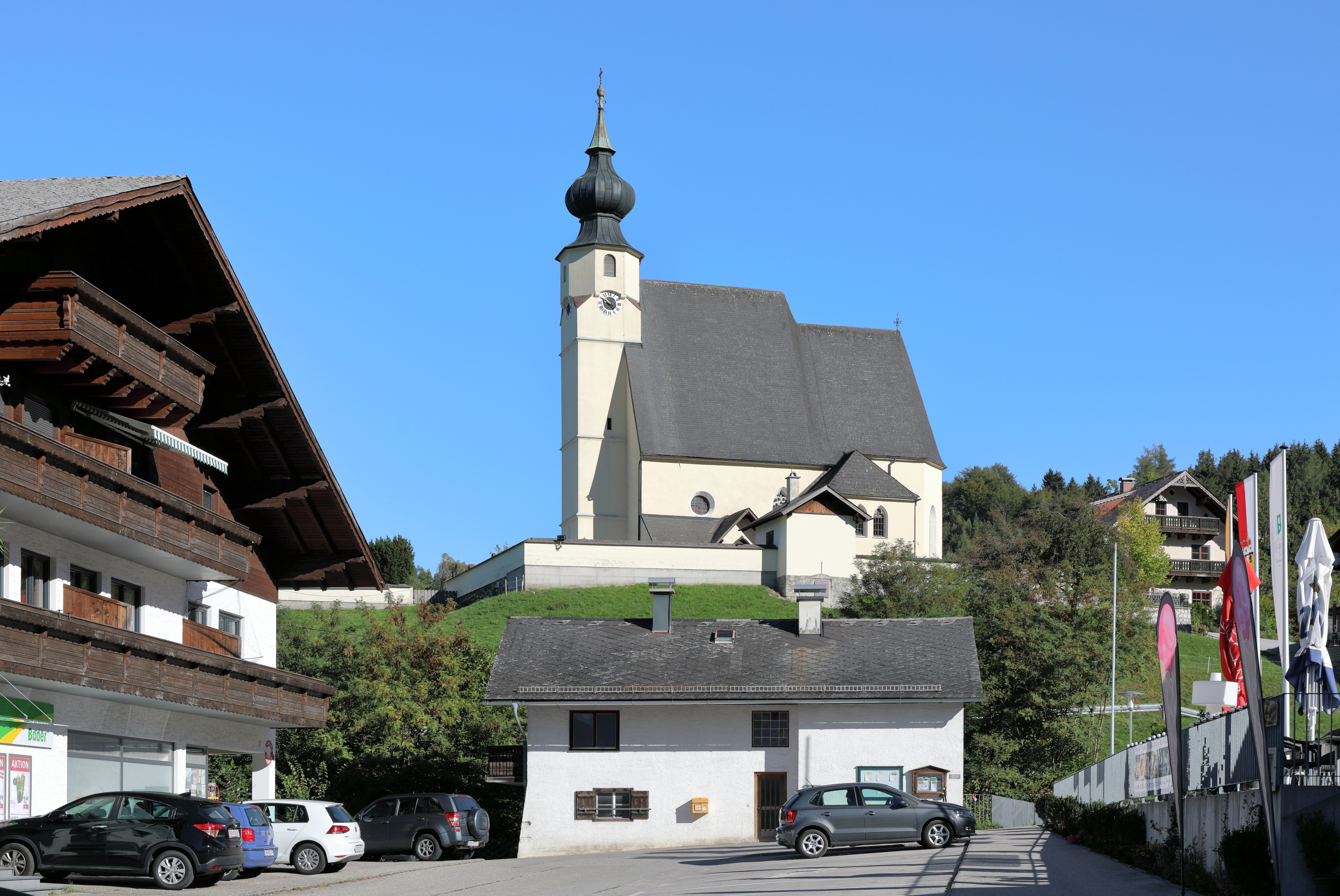 Das Ortszentrum der oberösterreichischen Gemeinde Steinbach am Attersee mit der in erhöhter Lage errichteten röm.-kath. Pfarrkirche hl. Andreas im Hintergrund.